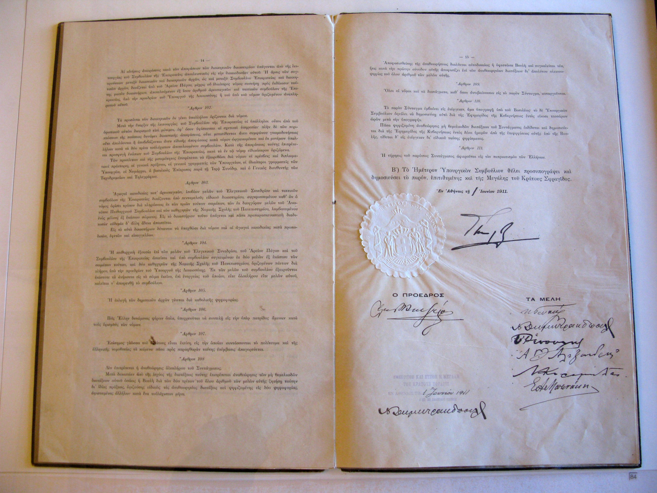 Το Σύνταγμα του 1911. Βιβλιοθήκη της Βουλής.